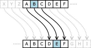 Şifreleme : azerEncryption Metodu